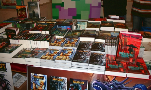 Algoritmova izdanja na SFeraKonu u Zagrebu